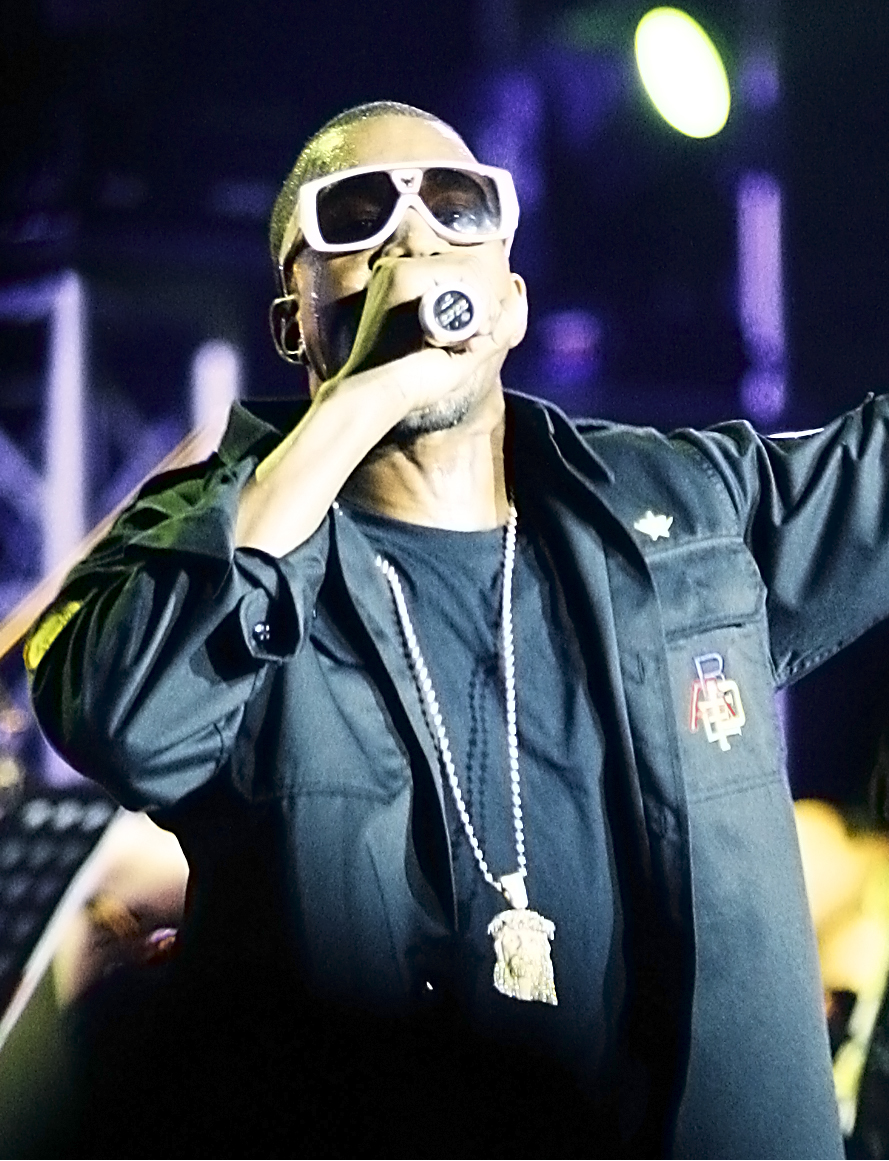 Kanye West performing in Kuala Lumpur, Malaysia.